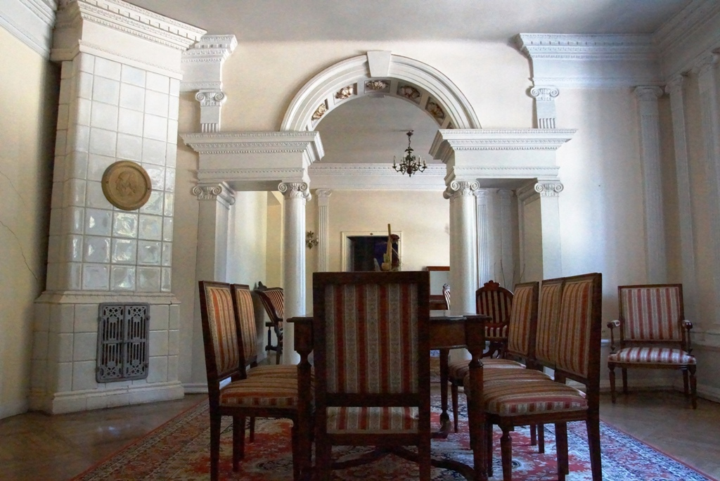 Kielce, oficyna, 1848-1856 r.